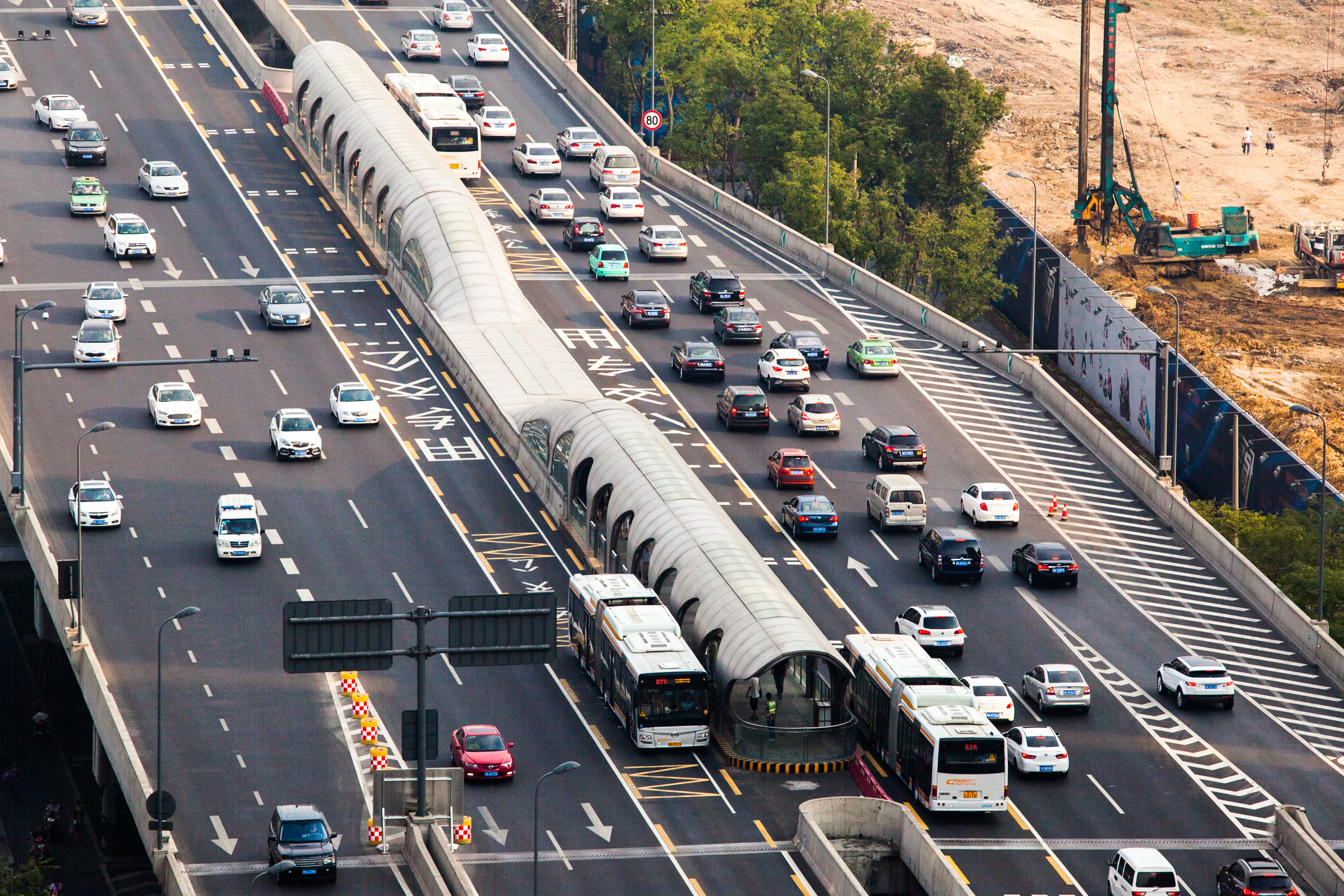 中文（中国大陆）: 成都快速公交桃溪路口站